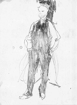 Foto van een tekening door I. Israels van Paul Verlaine, door Willem Witsen. (Collectie Prentenkabinet/Studie en Documentatie Centrum voor Fotografie (SDCF), Universiteit Leiden, inv.nr. E.397 )